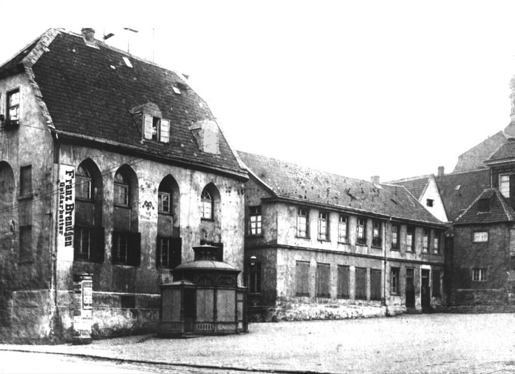 Essen, Kopstadtplatz, 1878